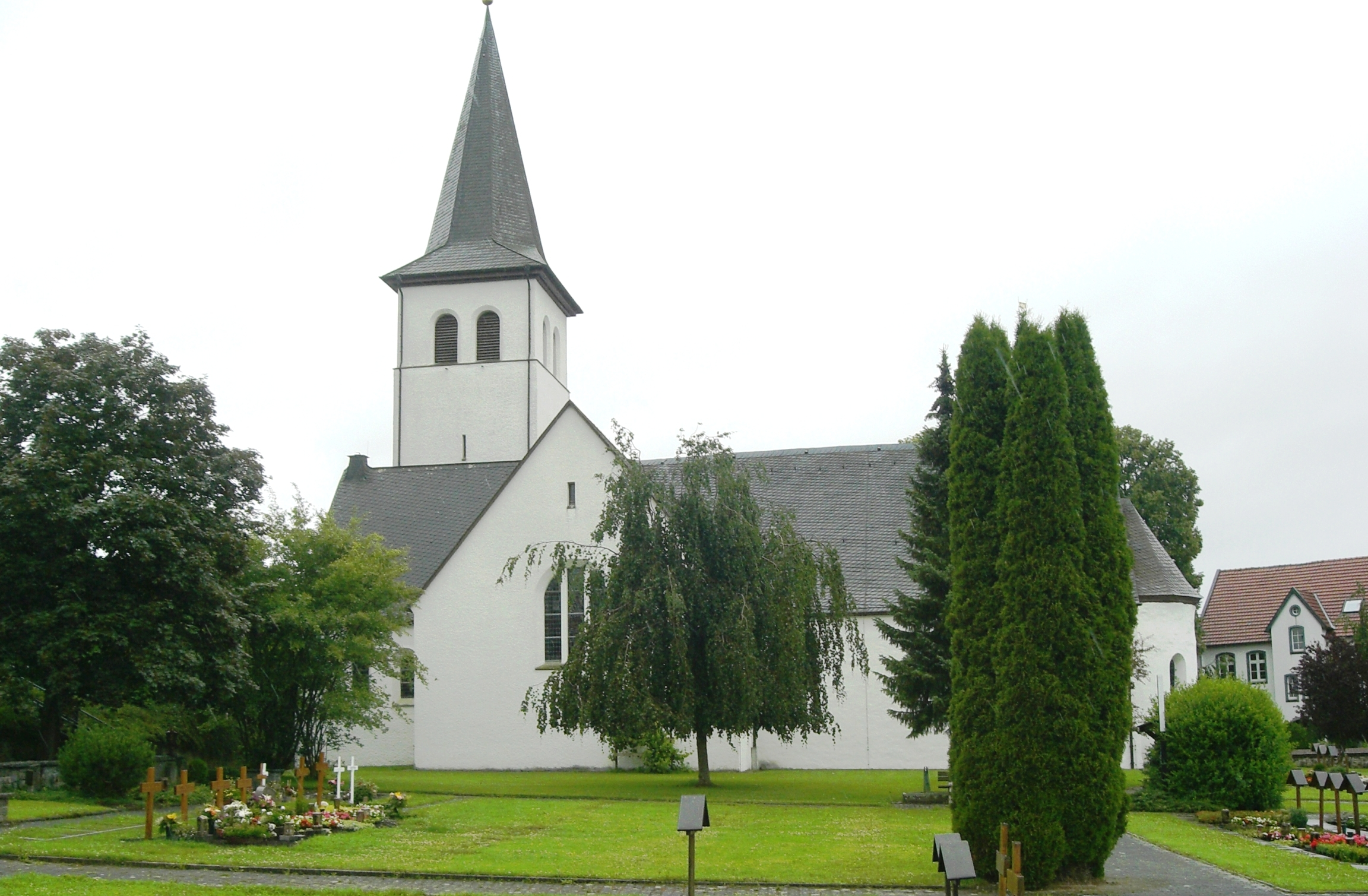 ortsprägender romanischer Kirchbau